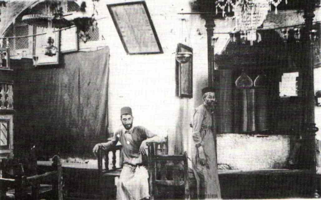 Abraham Avinu Synagogue, Hebron 1925.